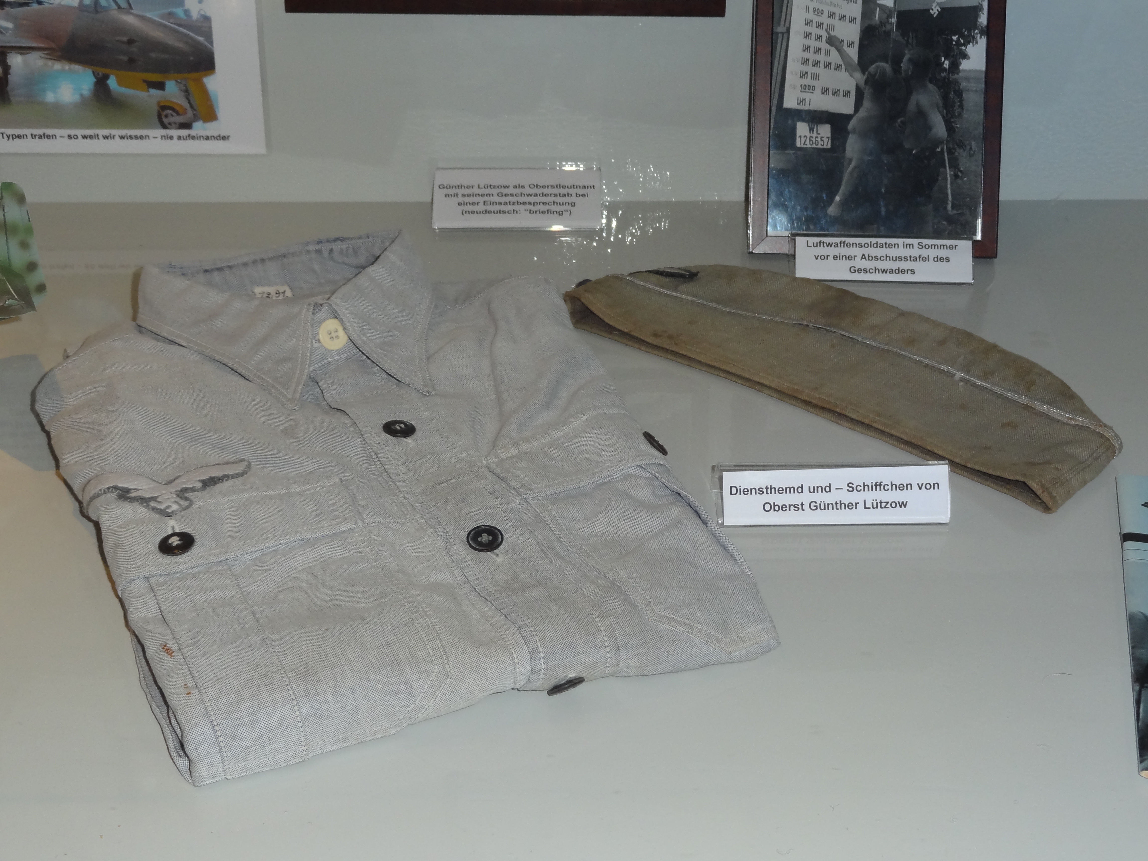 Shirt an cap of Günther Lützow, Luftfahrt-Museum Laatzen-Hannover